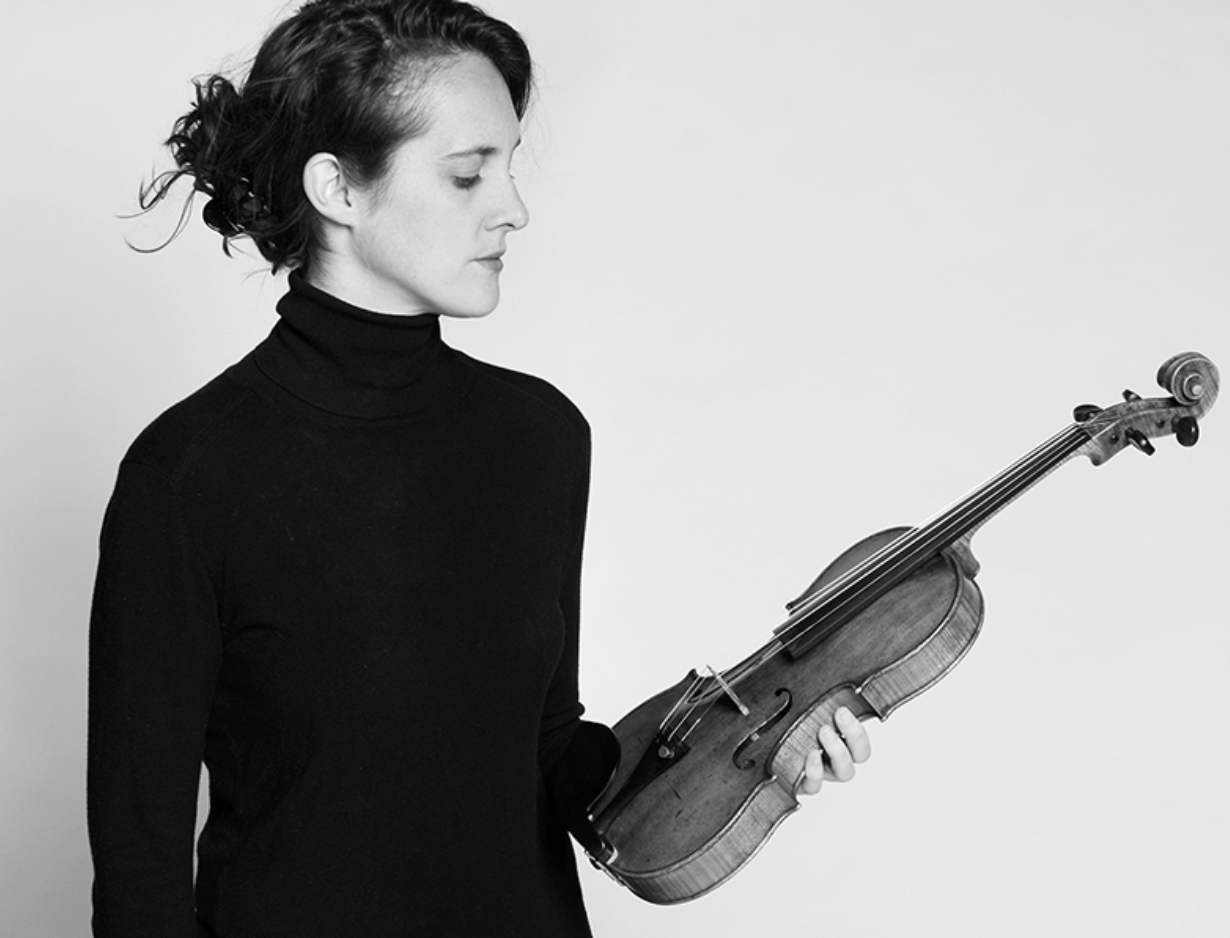 Fiona Monbet juin 2018